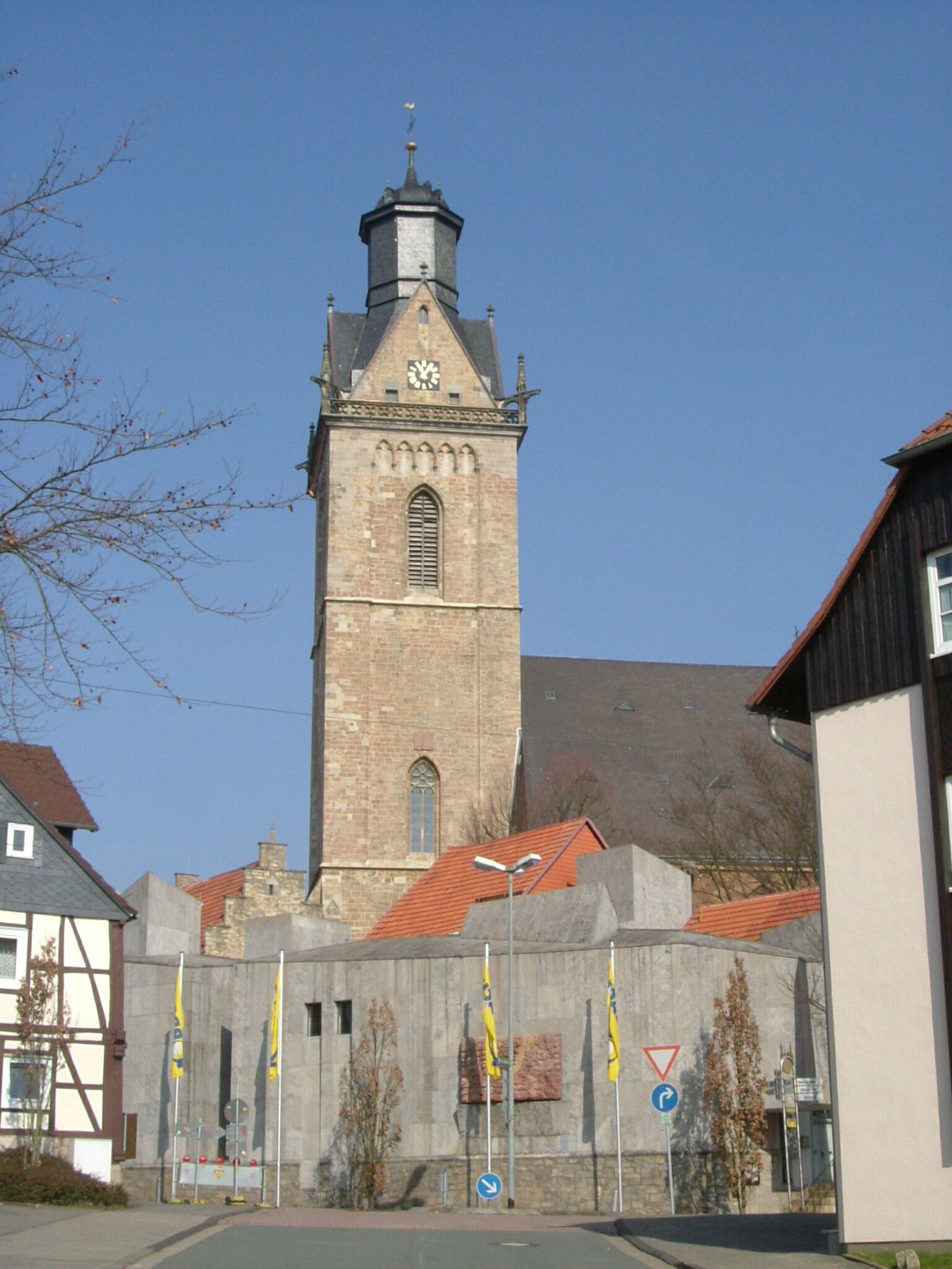 Korbach, Germany. Kiliankirche